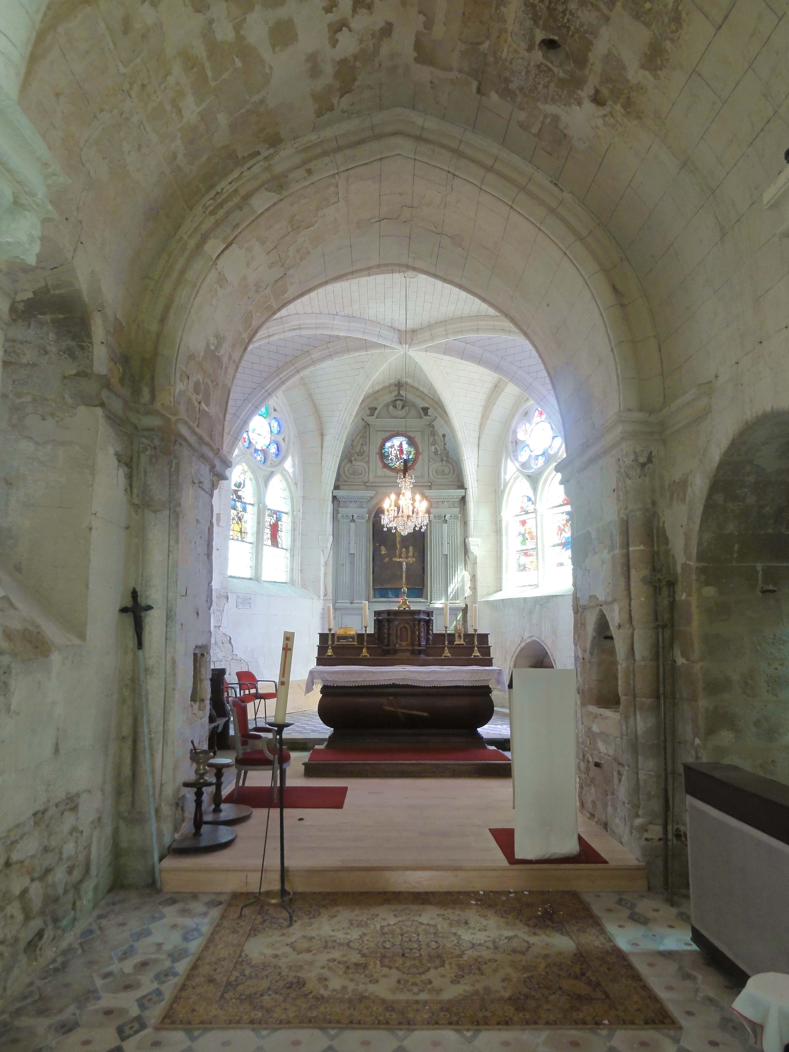 Intérieur de l'église (voir titre).